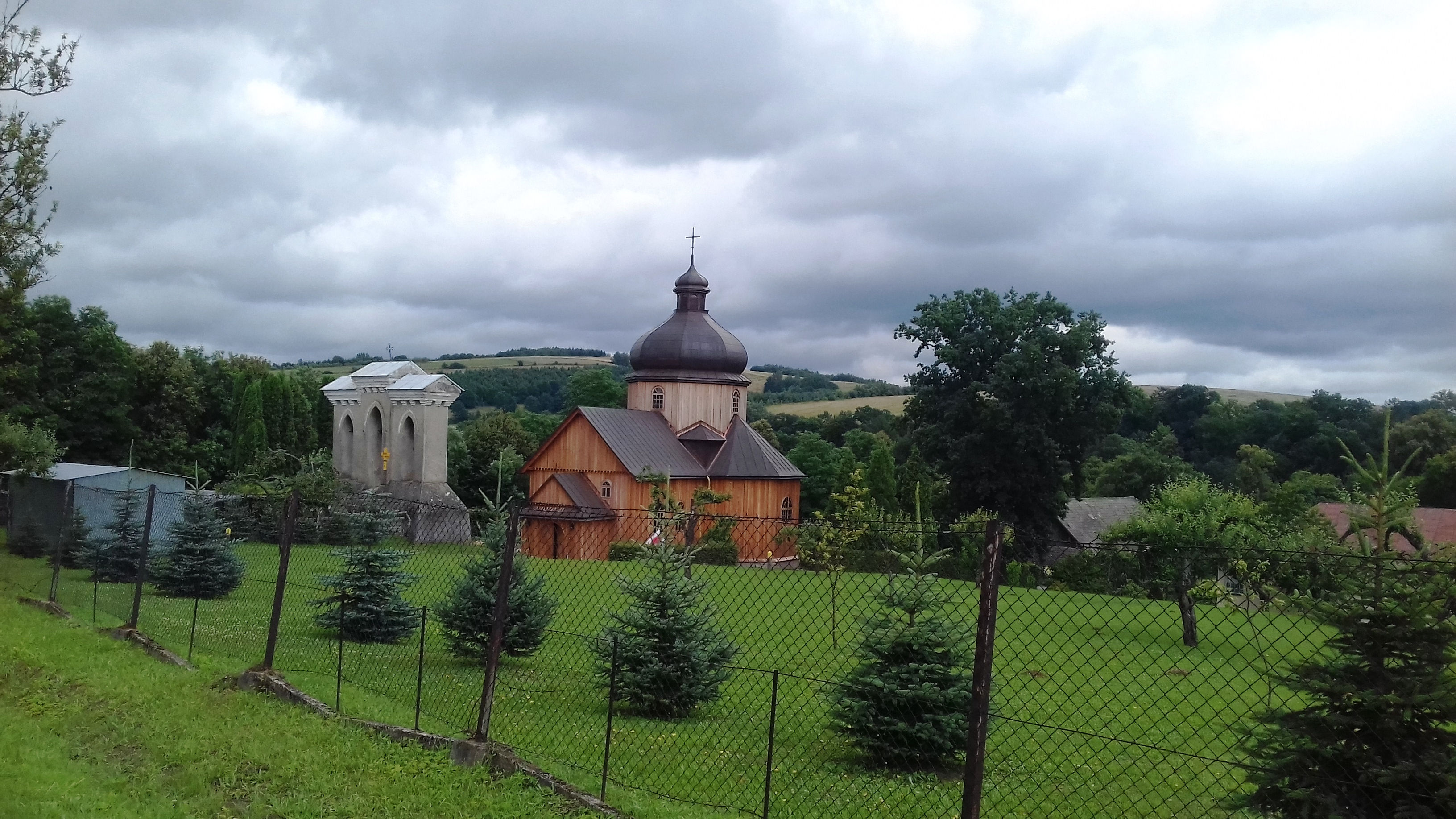 Końskie (gm. Dydnia, pow. Brzozów) - cerkiew Przemienienia Pańskiego